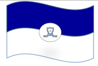 Bandera de la Institución Educativa Antonia Santos de Sincé, Sucre.